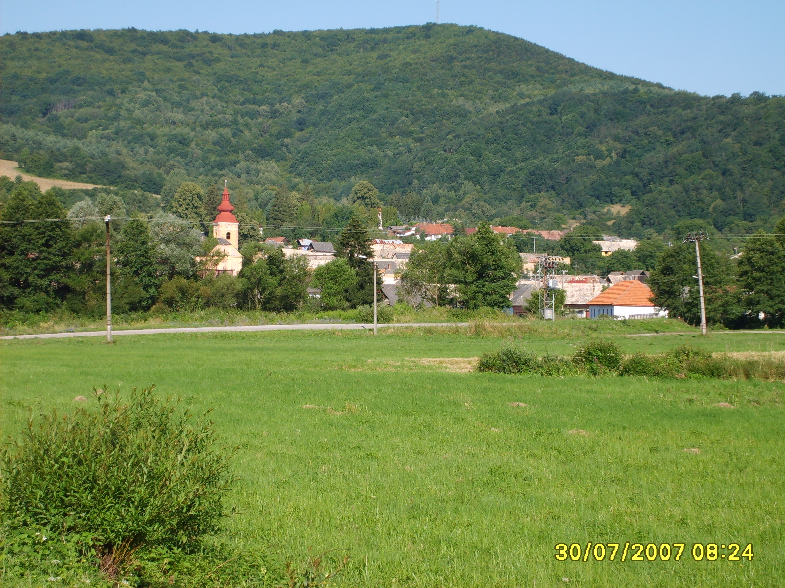 Ratková od Repíšť